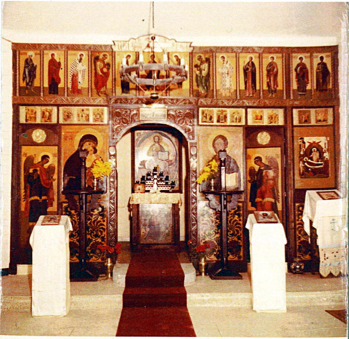 L'iconostase de l'église orthodoxe russe de Casablanca pendant qu'elle était ouverte au public. Иконостас еще действующего Успенского храма в Касабланке.